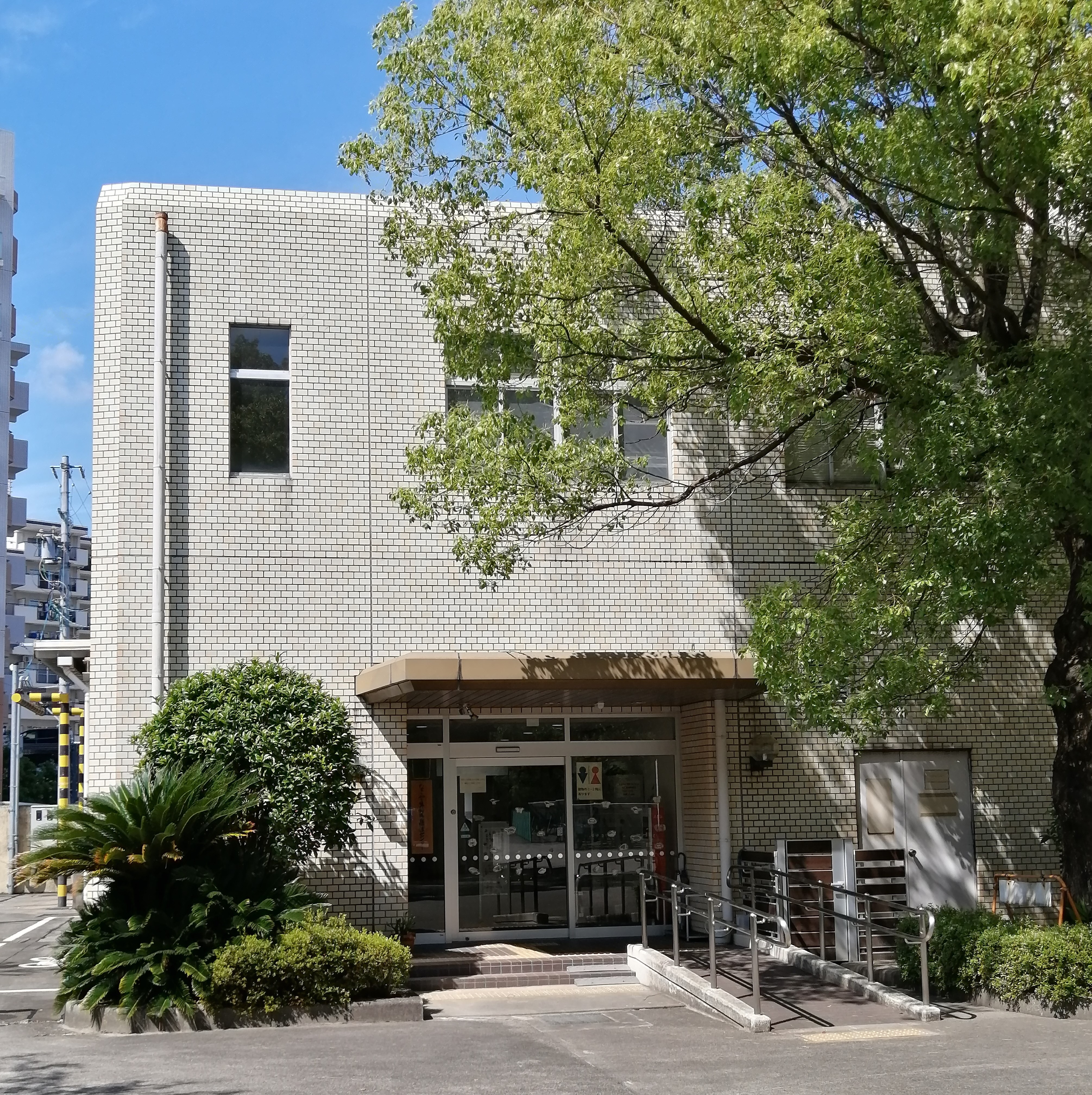 名古屋市の生きものに関する情報を収集・発信し、身近な自然の調査・保全活動を推進することを目的に設立させた、名古屋市の施設。名古屋市天白区に所在。